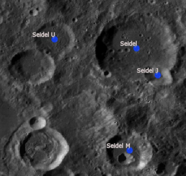 Cráter lunar Seidel. Cráteres satélite. (Imagen LRO)